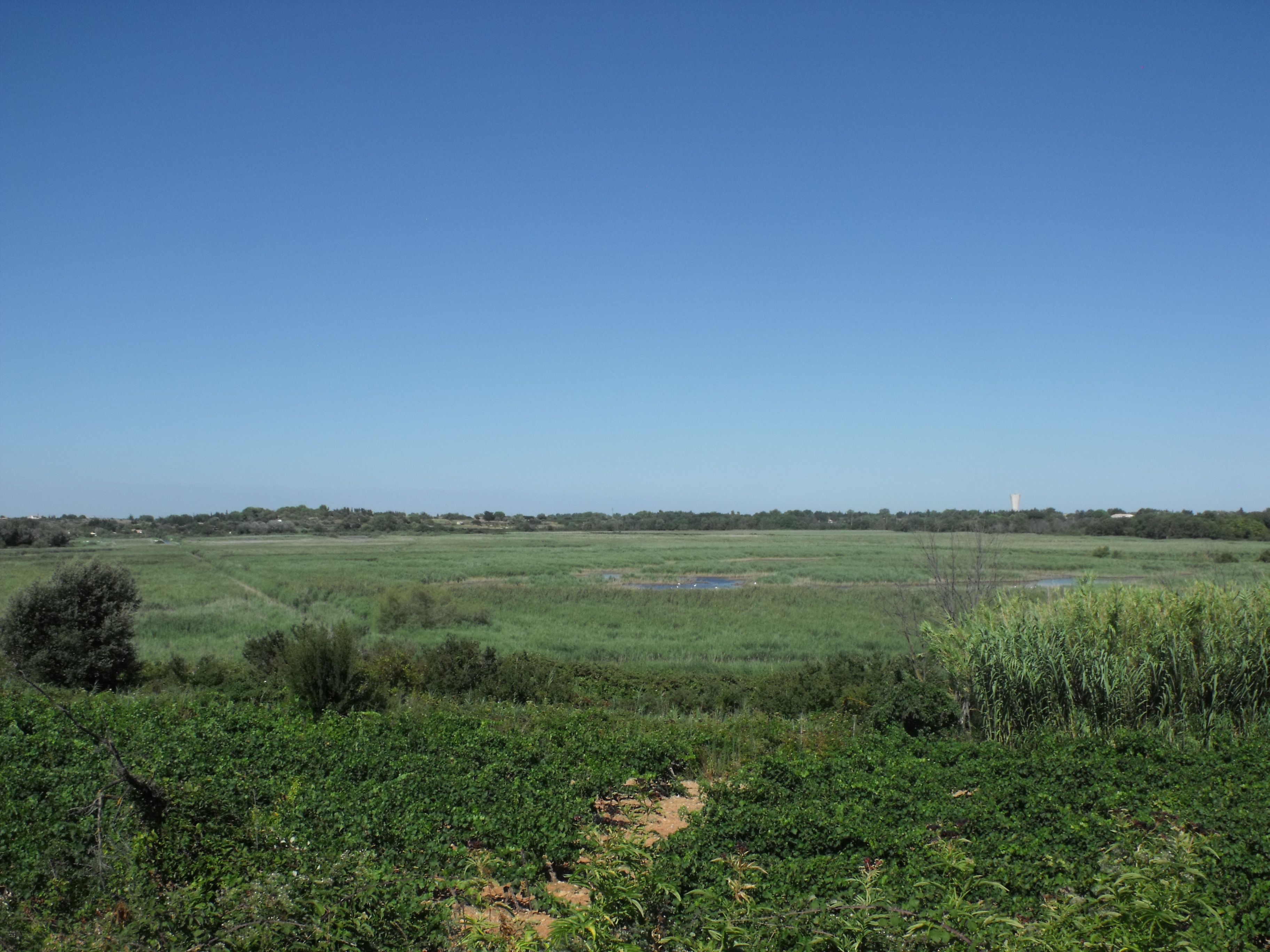 Réserve naturelle nationale de l'Estagnol - Villeneuve les Maguelone, Hérault, France